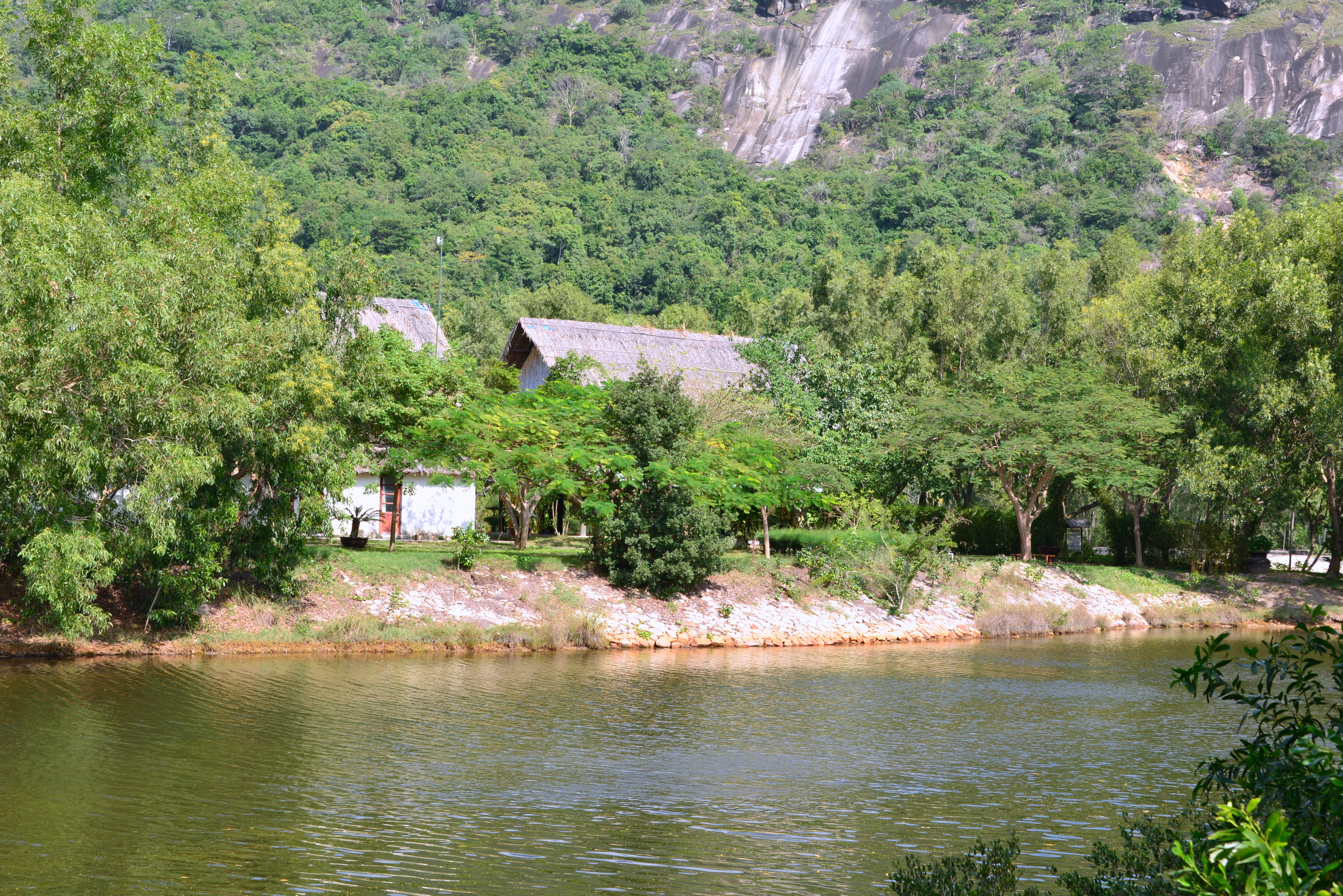 Ninh Vân, tx. Ninh Hòa, Khánh Hòa, Vietnam